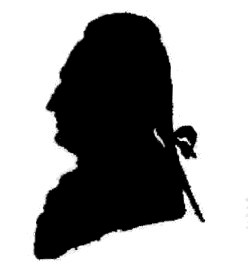 Silhouette datée de 1776 du compositeur Georg Christoph Wagenseil. Seul portrait connu de lui.